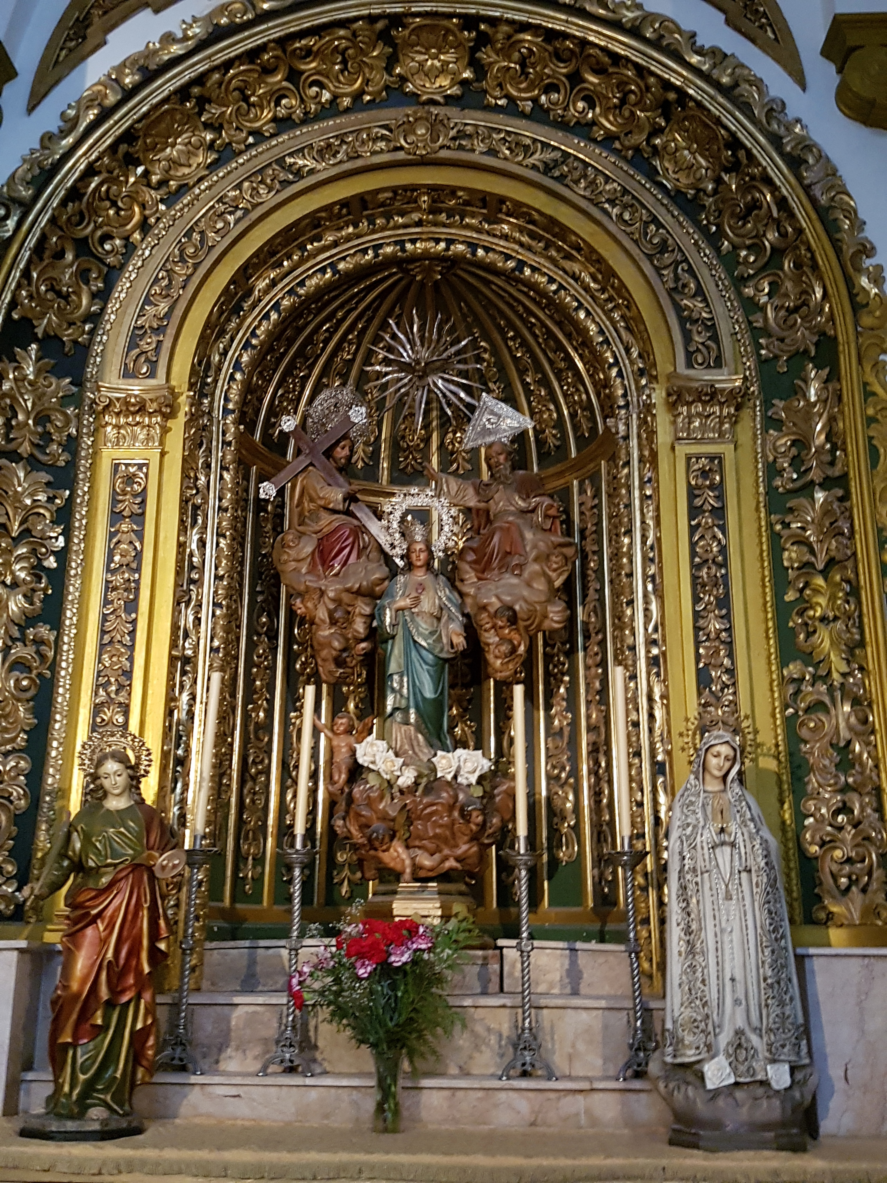 Capilla de Nuestra Señora de las tres Avemarías. La estatuilla de la izquierda es San Lucía; al centro, Nuestra Señora de las tres Avemarías y a la derecha, la Virgen de Fátima.